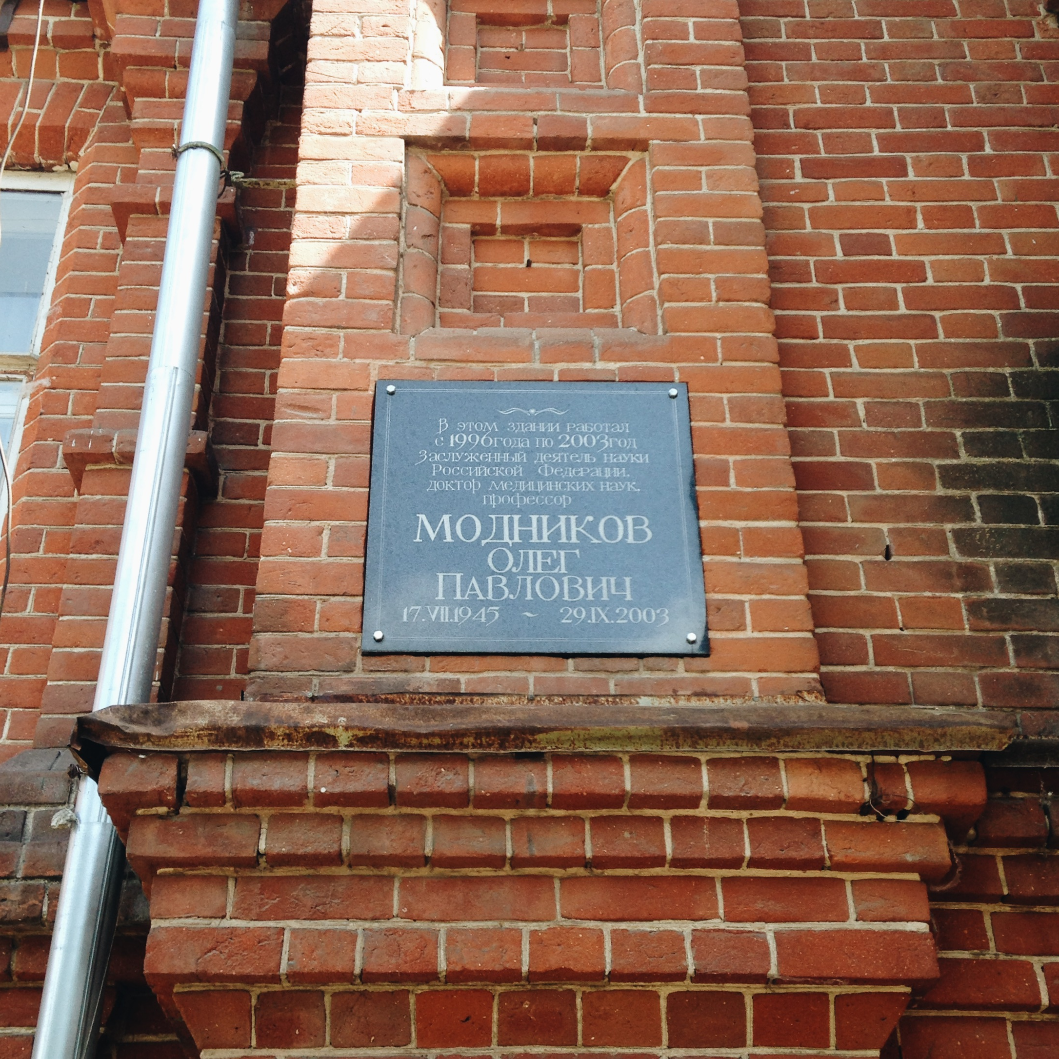 В этом здании работал с 1996 года по 2003 год Заслуженный деятель науки Российской Федерации, доктор медицинских наук, профессор Модников Олег Павлович. 17.VII.1945 ~ 29.IX.2003